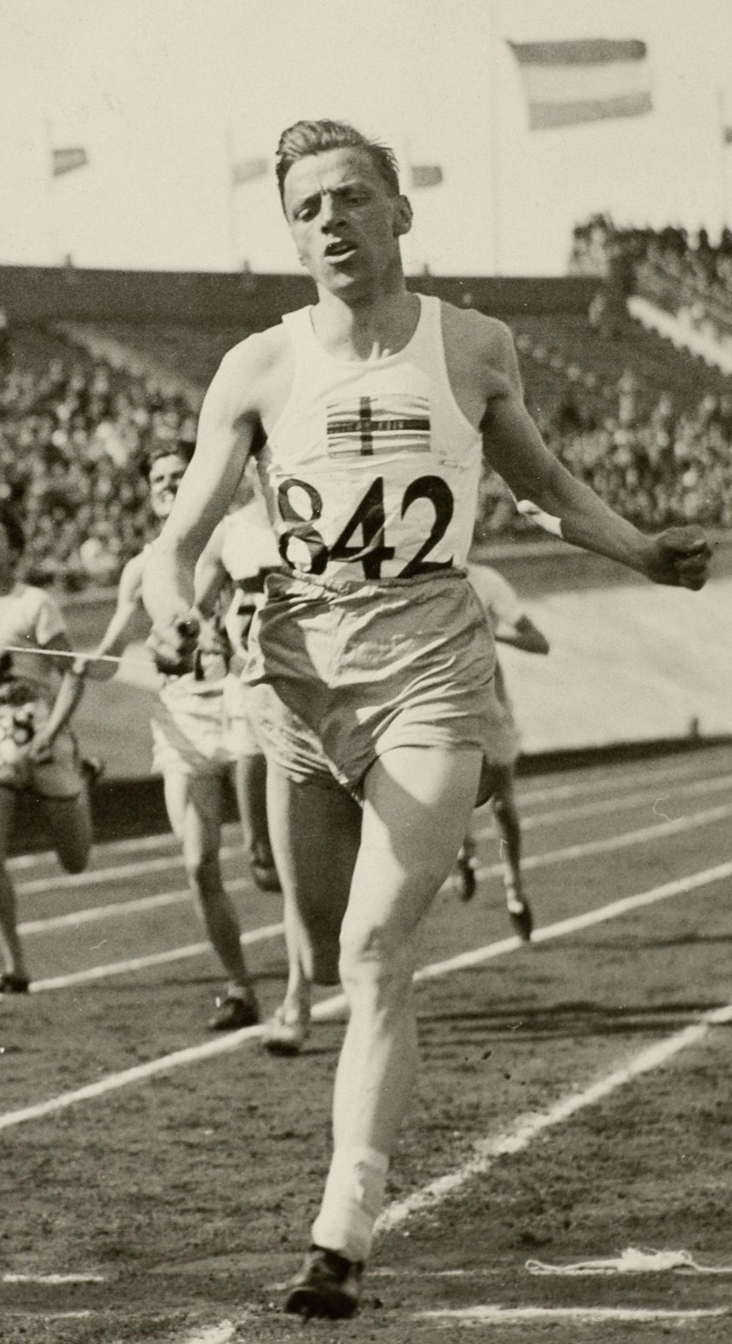 Sport. Sport, Olympische Spelen Amsterdam, 1928 : De Zweedse atleet Erik Byléhn, die zilver won op de 800 meter hardlopen (mannen).